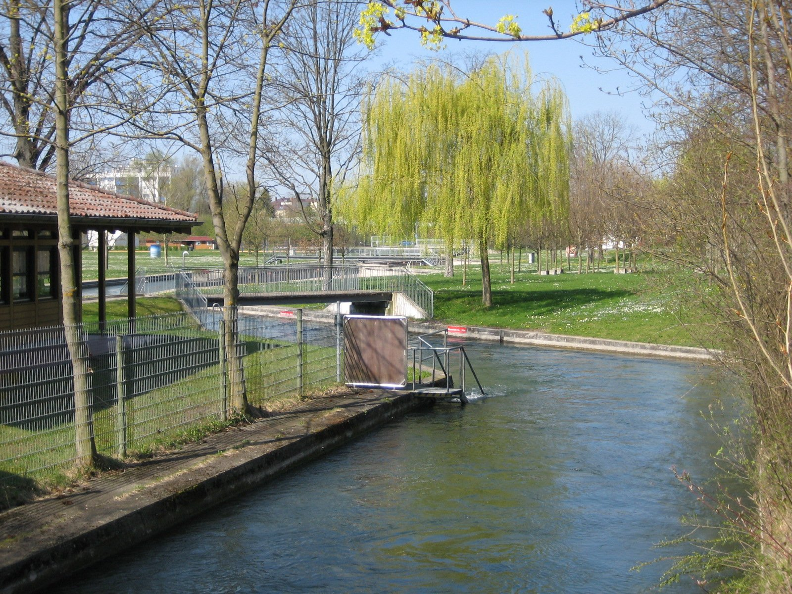 Augsburg, Freibad "Fribbe", Knick des Kaufbachs. Das zuvor geradeaus führende Bachbett musste beim Bau der Schleifenstraße verlagert werden.